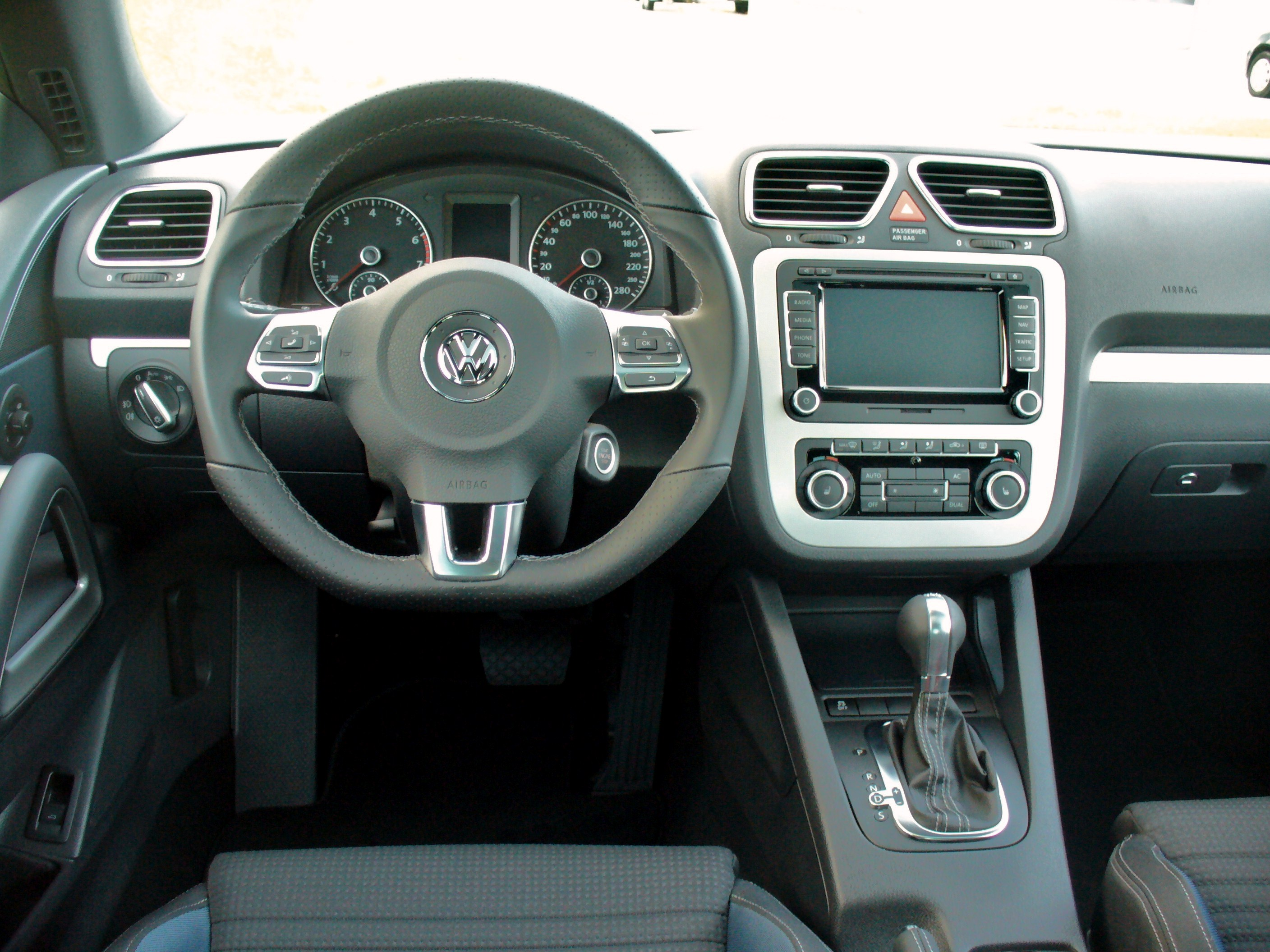 VW Scirocco III